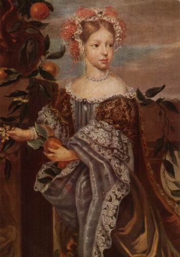 Bildnis der Prinzessin Leopoldine Eleonore von der Pfalz (1679-1693)